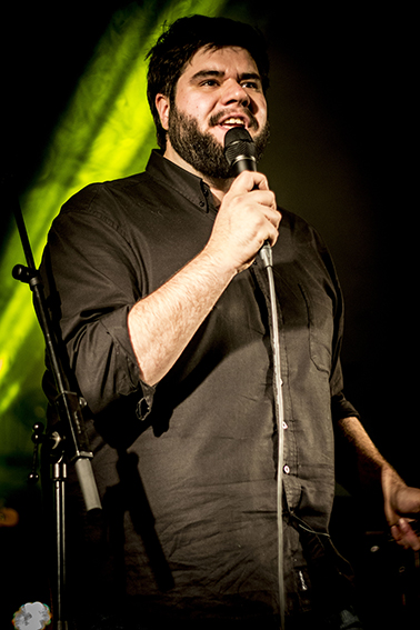 StampMedia/Milou Verstappen